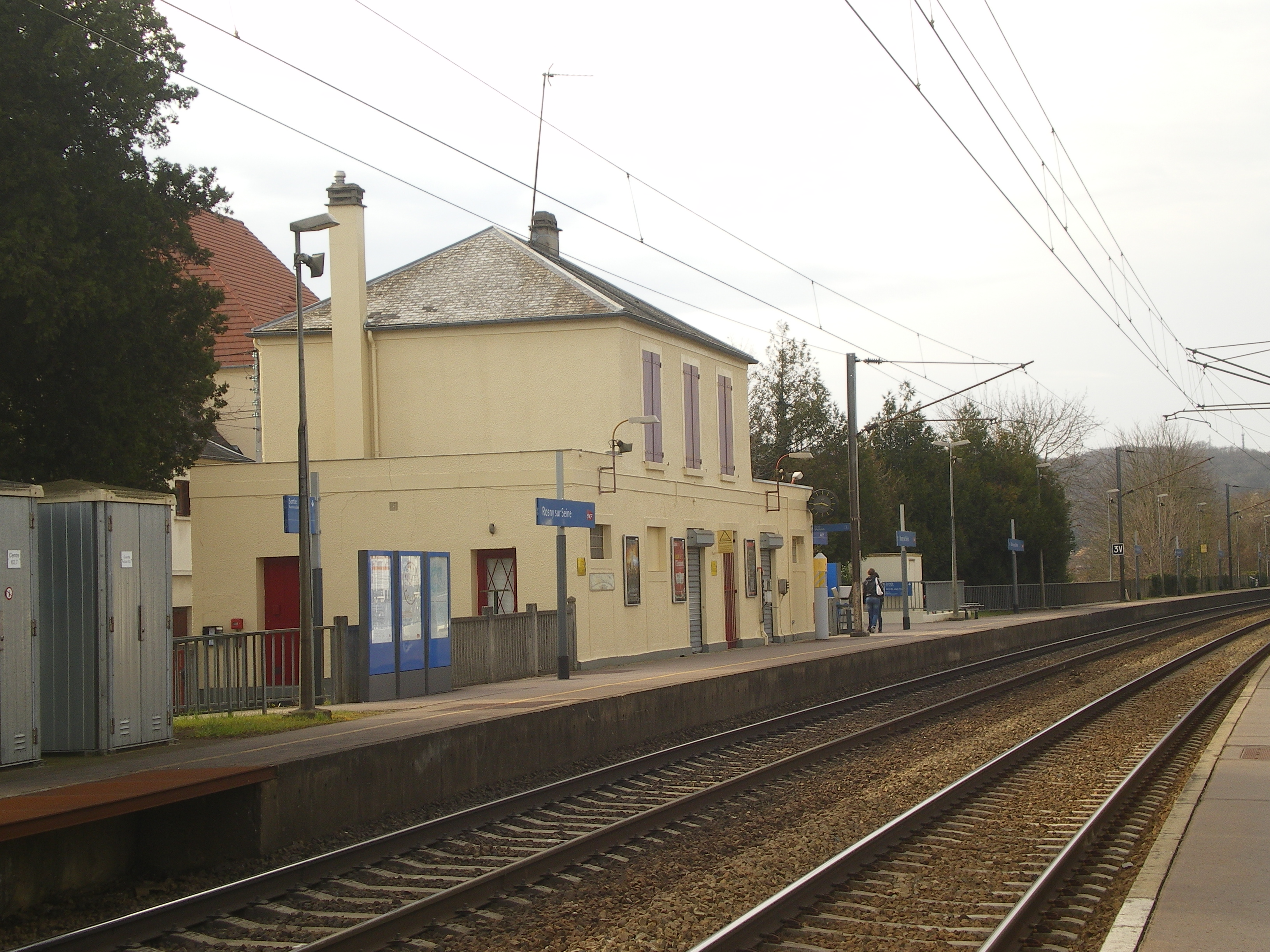 Gare de Rosny-Sur-Seine